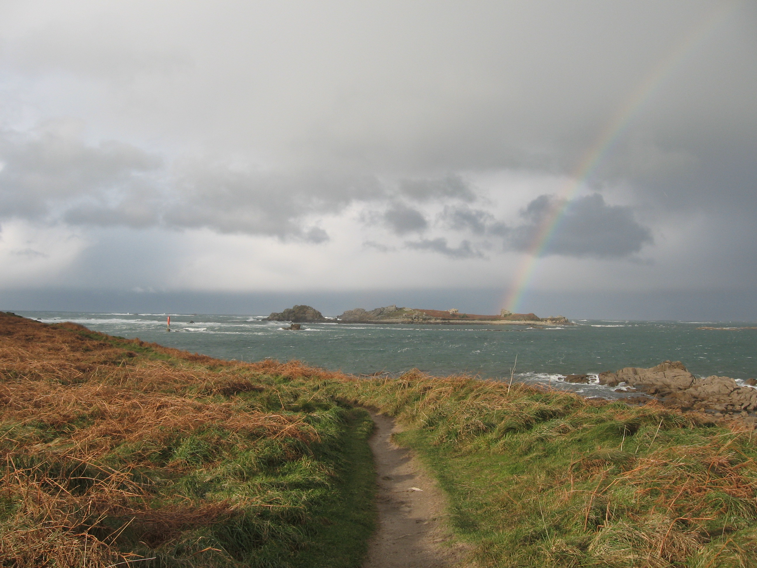 Arc en ciel sur l'île d'Yoc'h